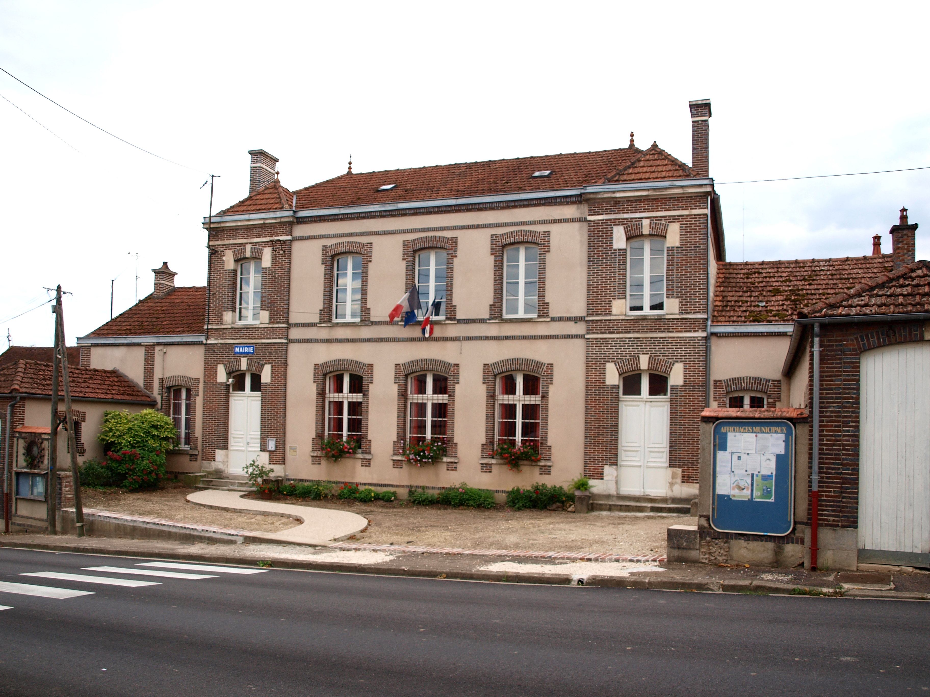 Saint-Aubin-sur-Yonne (Yonne, France) ; mairie